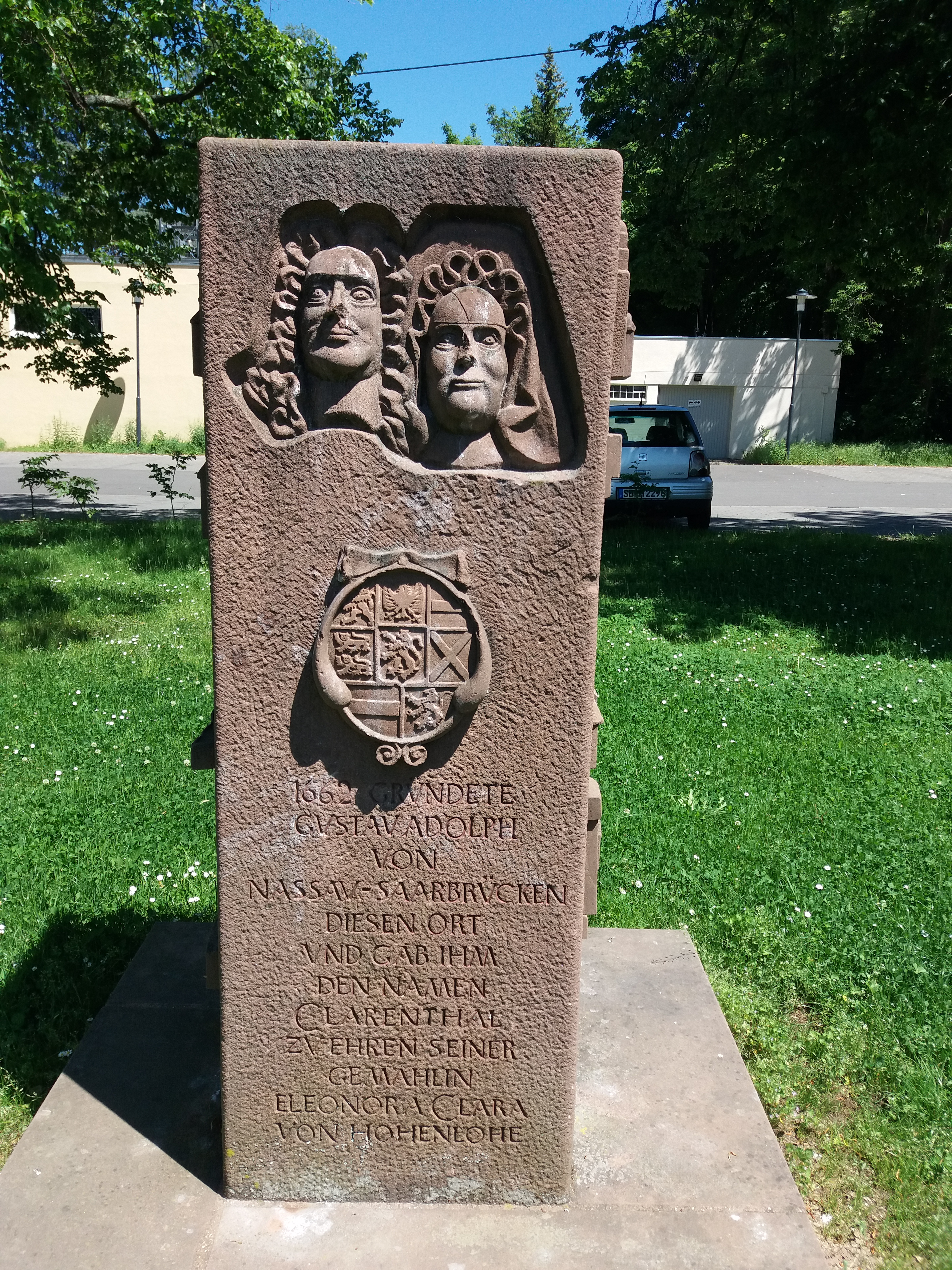 Gedenkstein zur Gründung des Ortes Klarenthal vom Bildhauer Kai Uwe Dräger